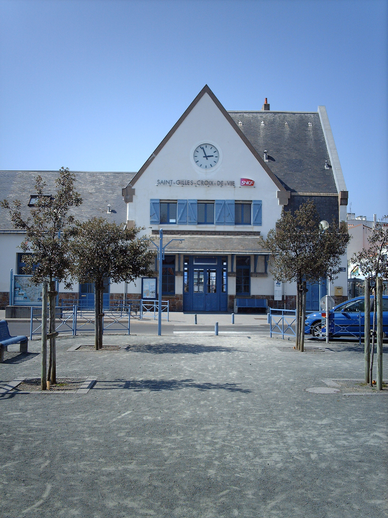 Saint-Gilles-Croix-de-Vie dans le département de la Vendée (France) : Façade du bâtiment voyageur de la gare, côté Croix-de-Vie, vue depuis la place de la gare en avril 2007.